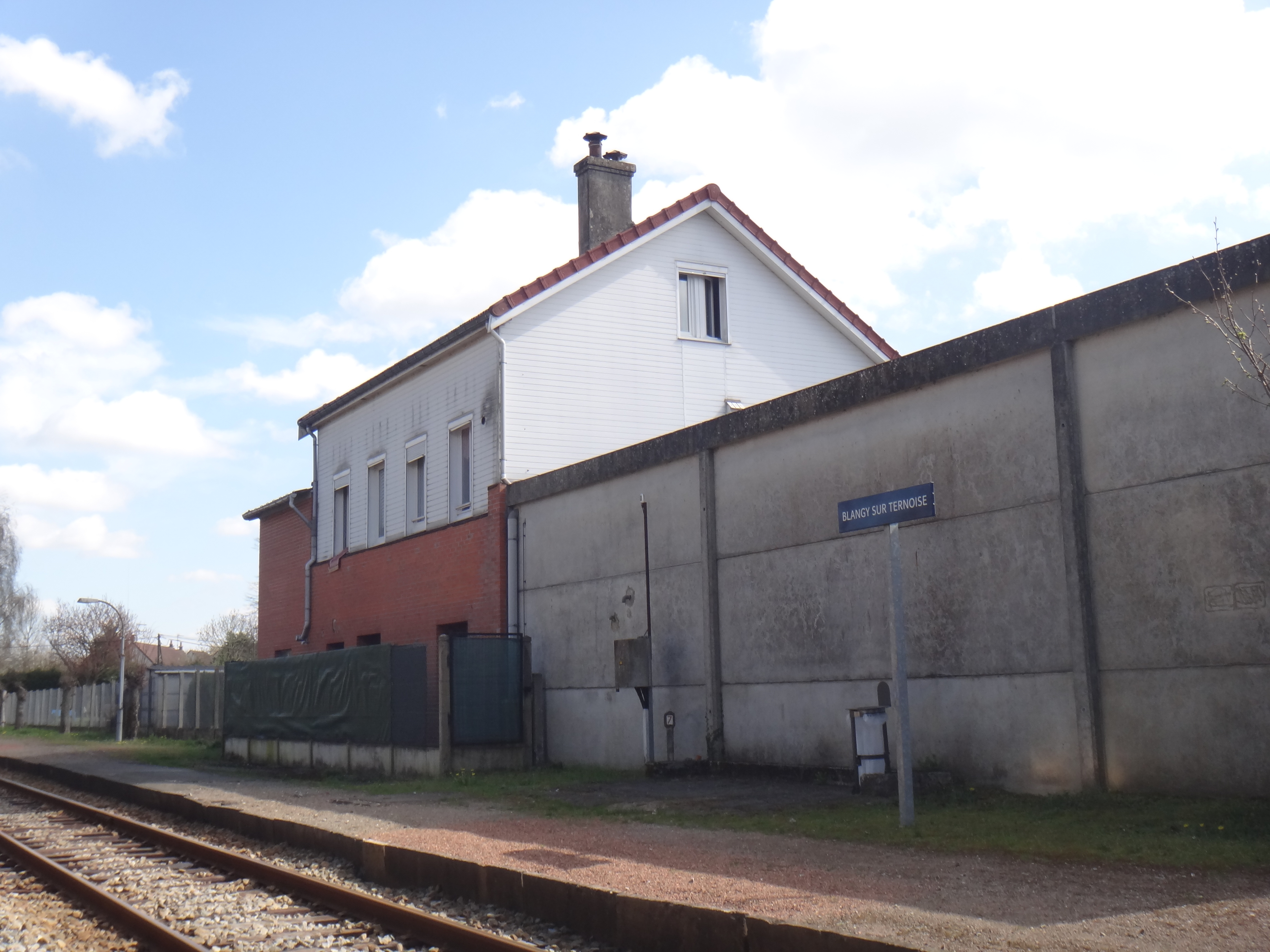 Gare de Blangy-sur-Ternoise, Pas-de-Calais, France, en 2014